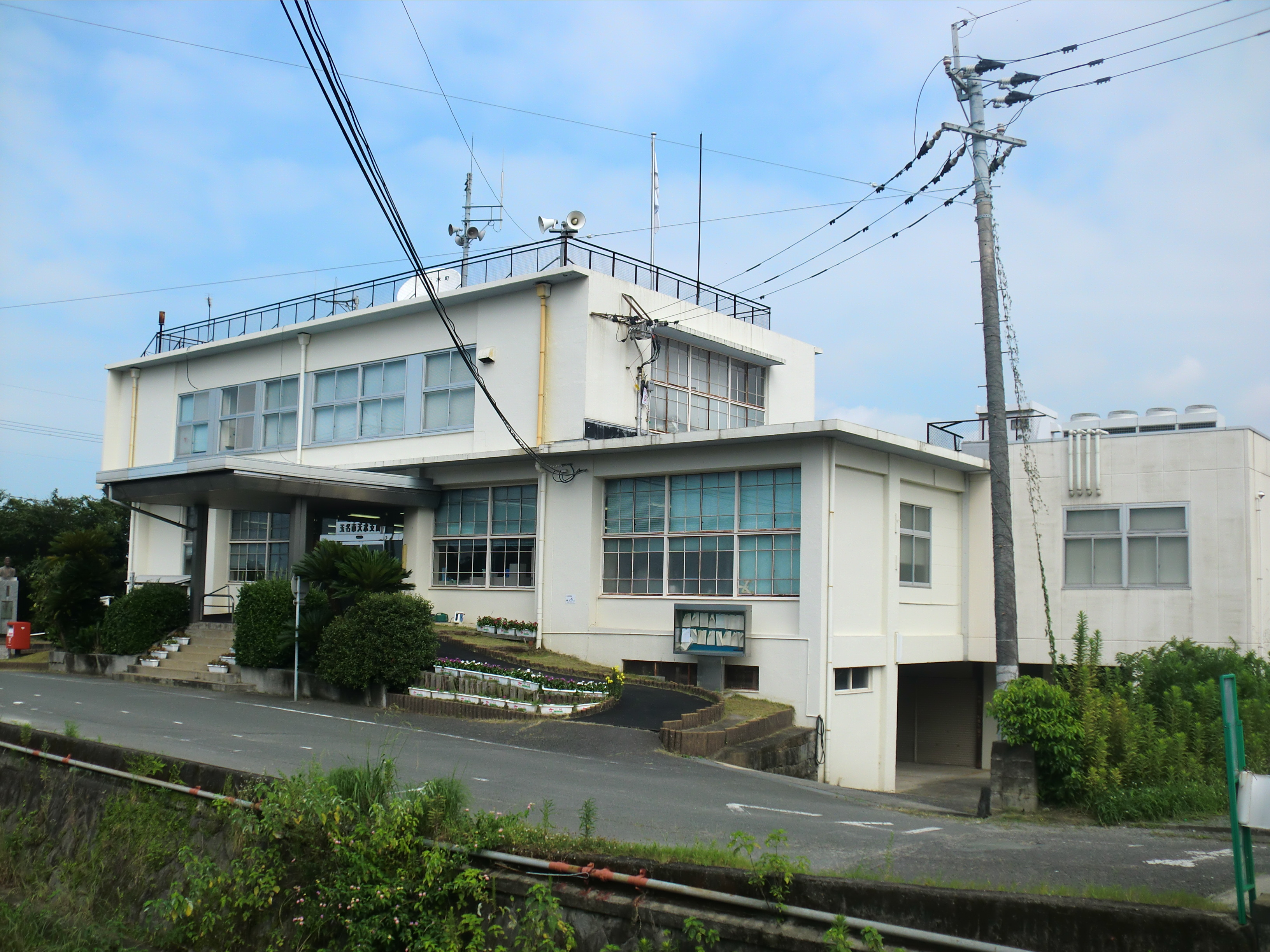 熊本県玉名市にある玉名市役所天水支所（旧：天水町役場）